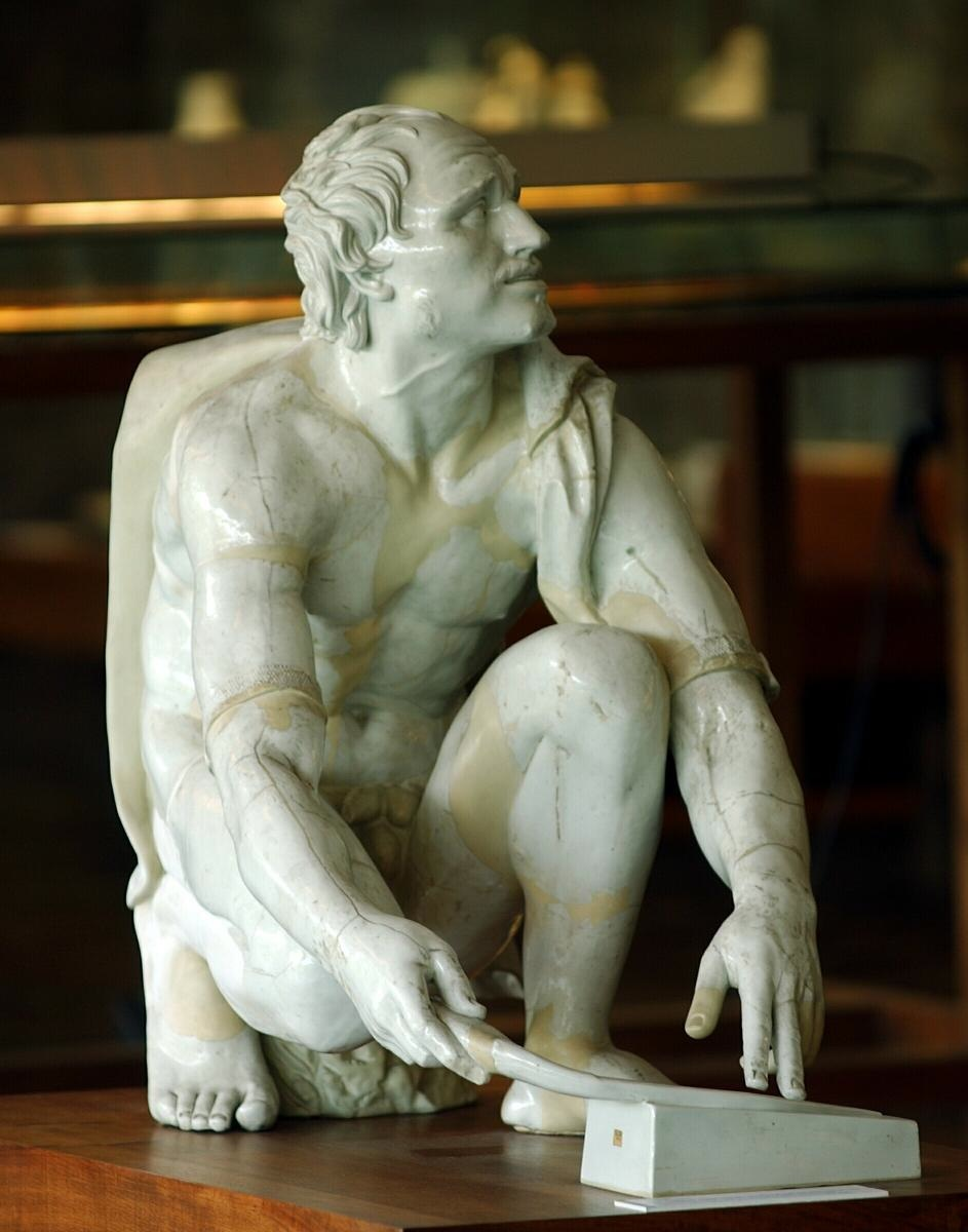 Gaspero Bruschi, Arrotino. Porcellana Ginori a Doccia 1745-1750